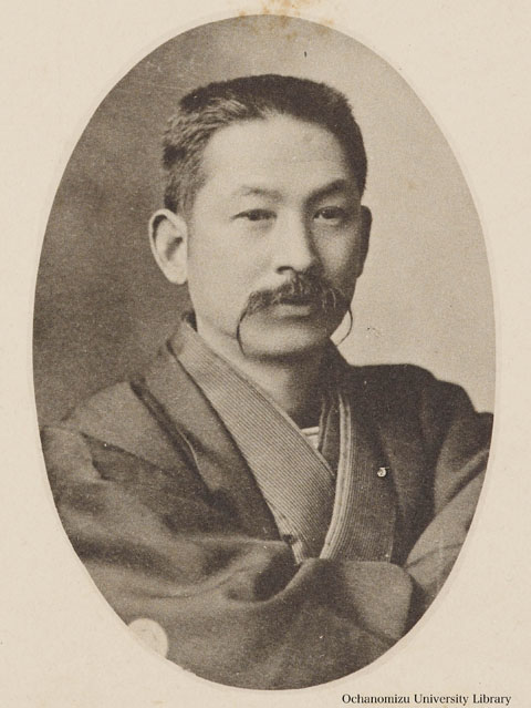 Araki Teijirō (Juppo)